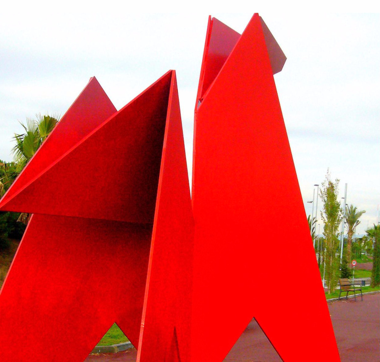 "Cavall Vermell" escultura en acero de Daniel Navas y Neus Solé representando un caballo de papel plegado